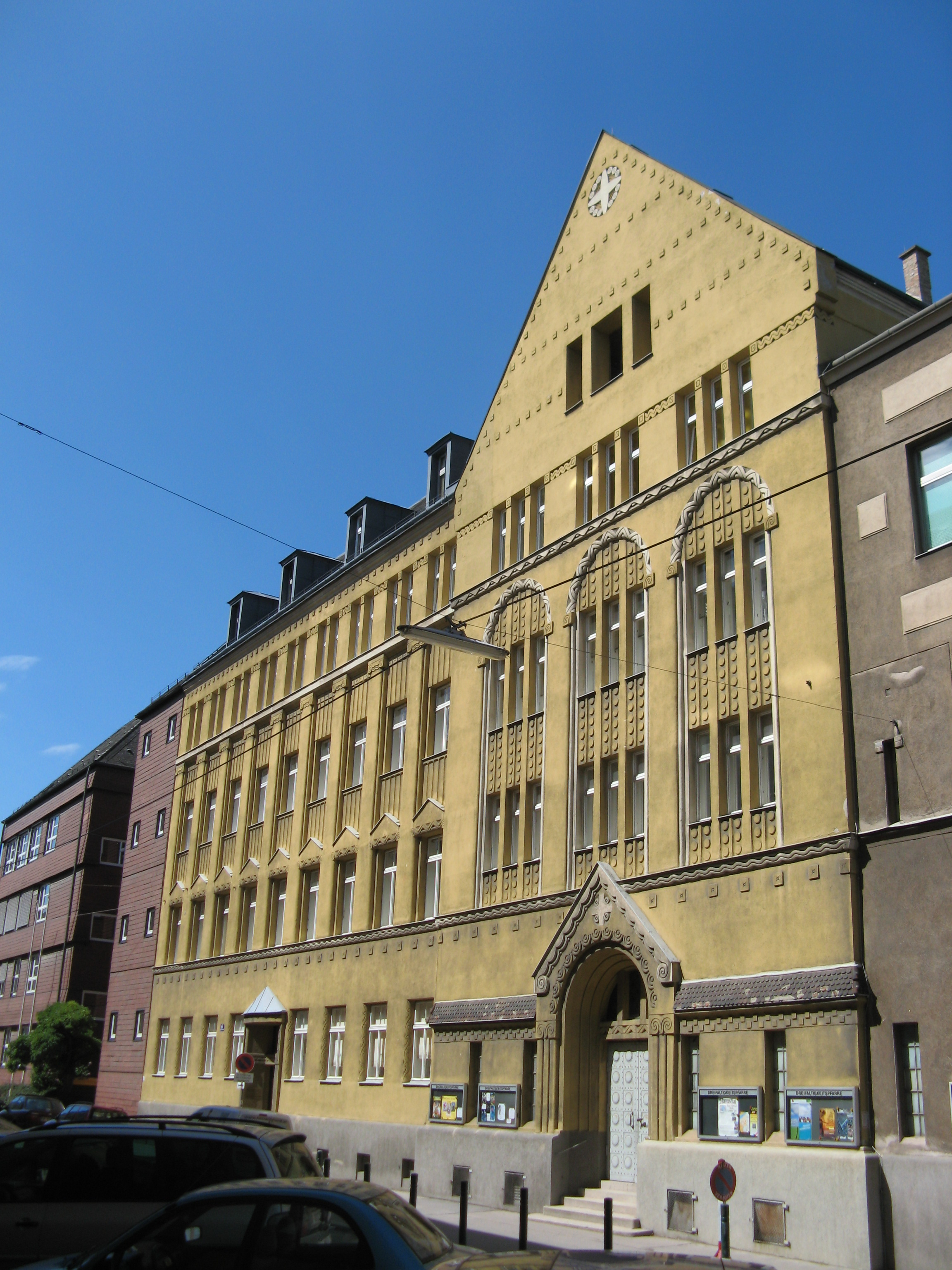 Dreifaltigkeitskirche (1913/14) von Richard Jordan, Alxingergasse 2, Wien-Favoriten